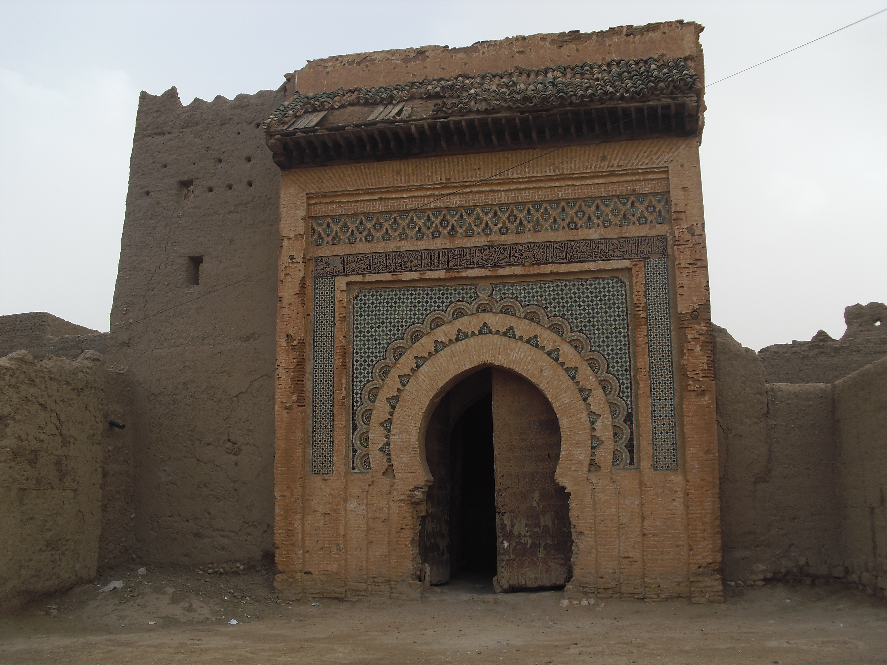 ksar lamaarka en image de sa porte monumentale (Bab Jdid) splende édifié par le sultan alaouite Moulay Ismail en 1721 pour loger un de ses fils, le prince Moulay Cherif.